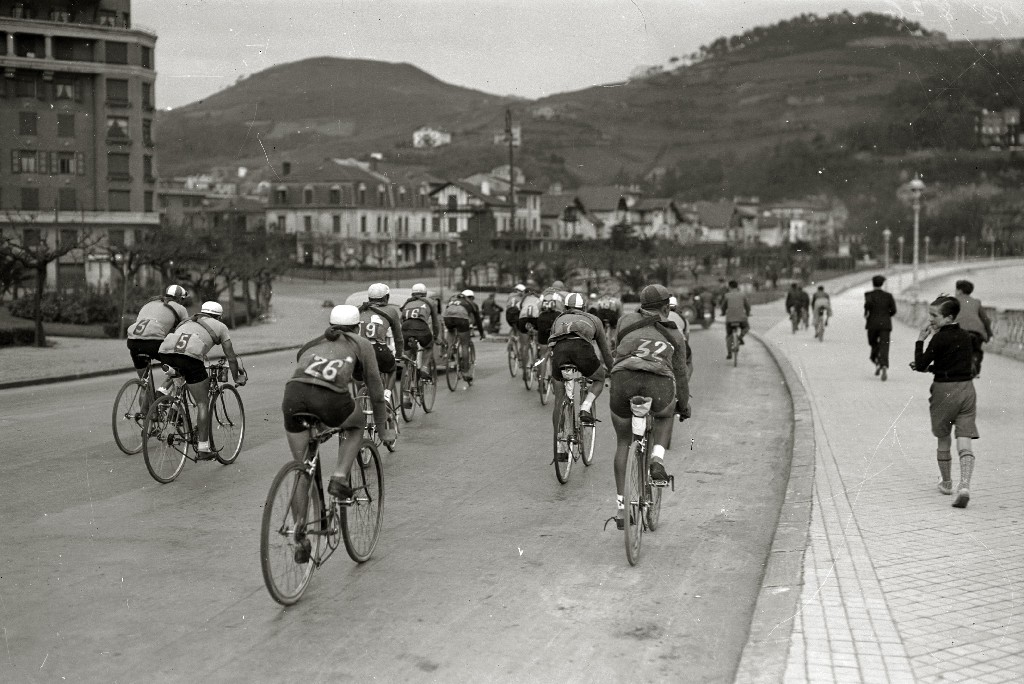 Título original: Celebración de la carrera ciclista 'Vuelta a España' (1/27) Localización: San Sebastián (Guipúzcoa)